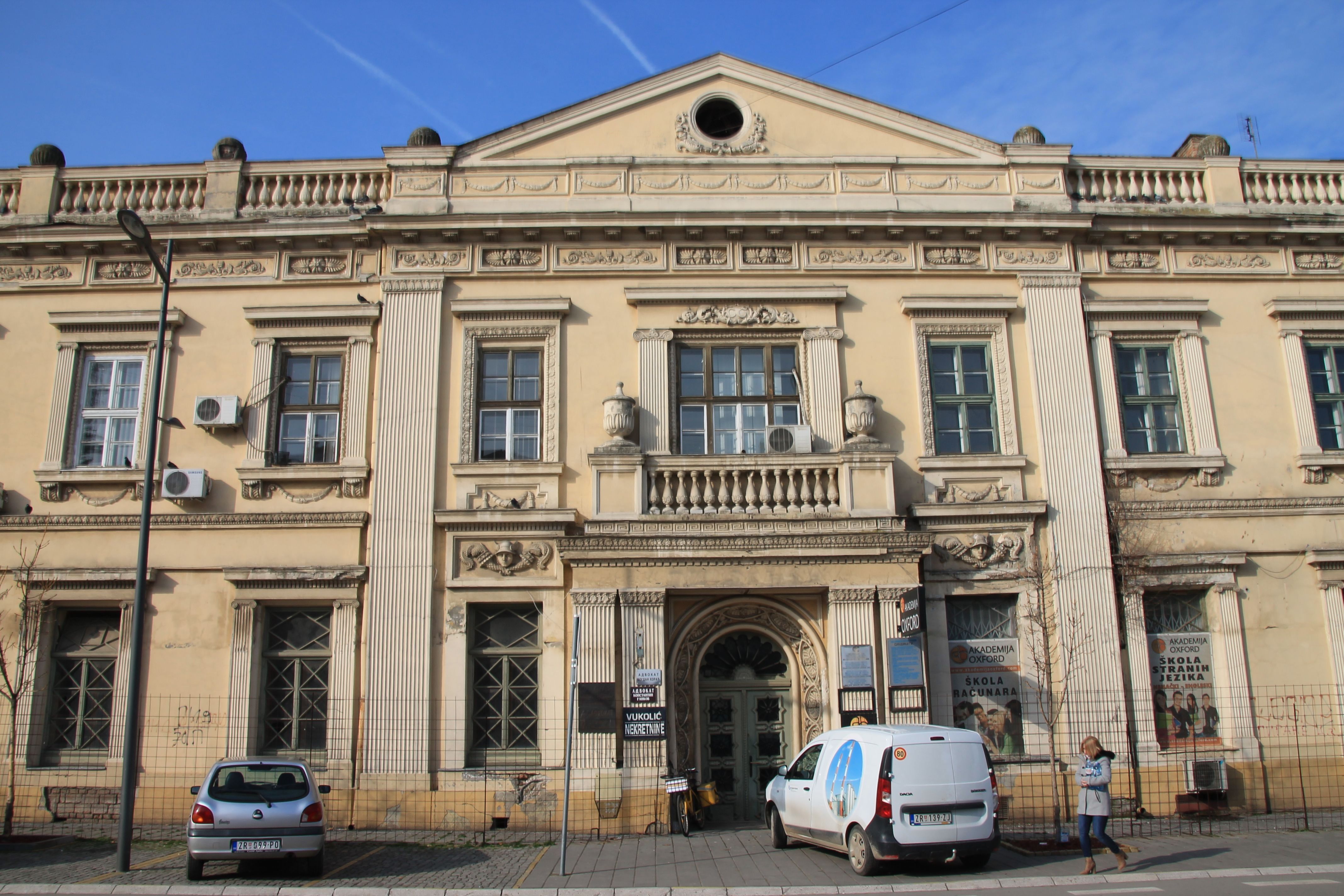 Staro jezgro Zrenjanina